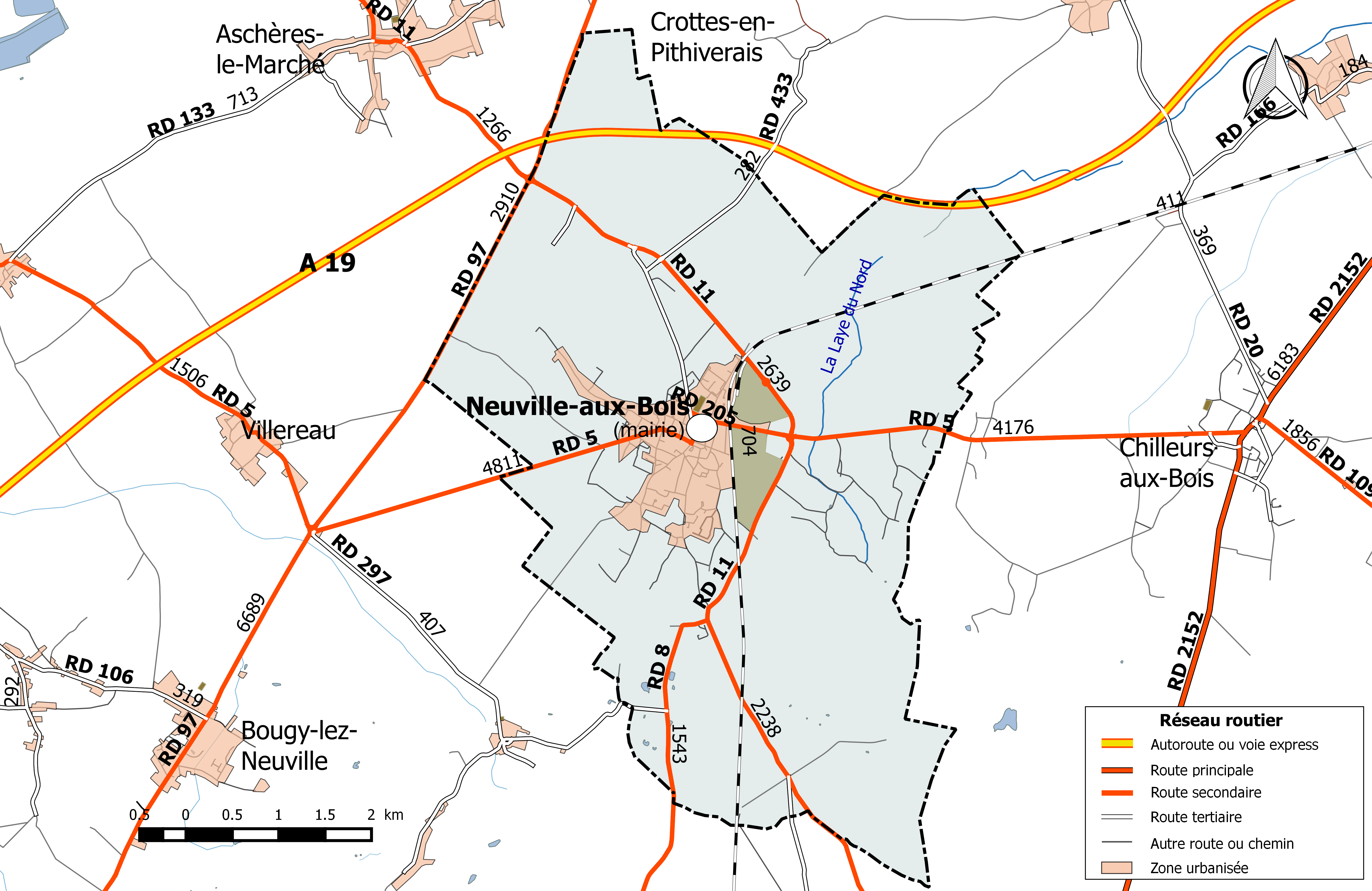 Carte du réseau routier de la commune de Neuville-aux-Bois (Loiret).